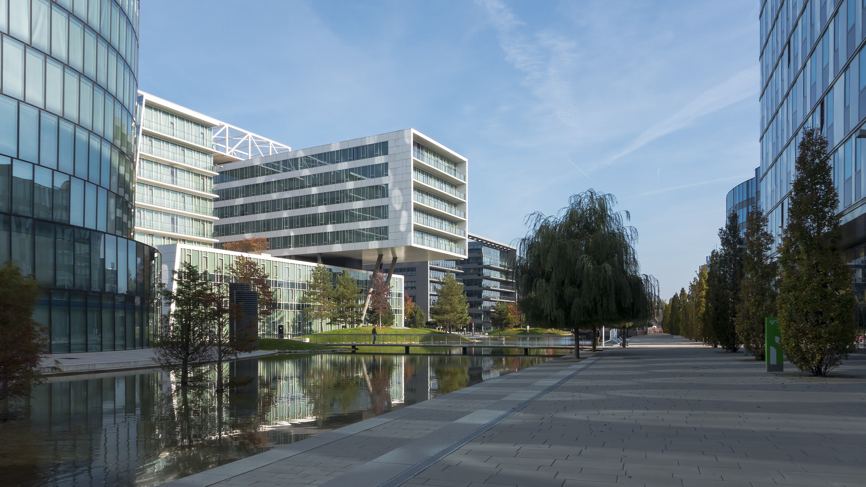 Viertel Zwei in Wien 2